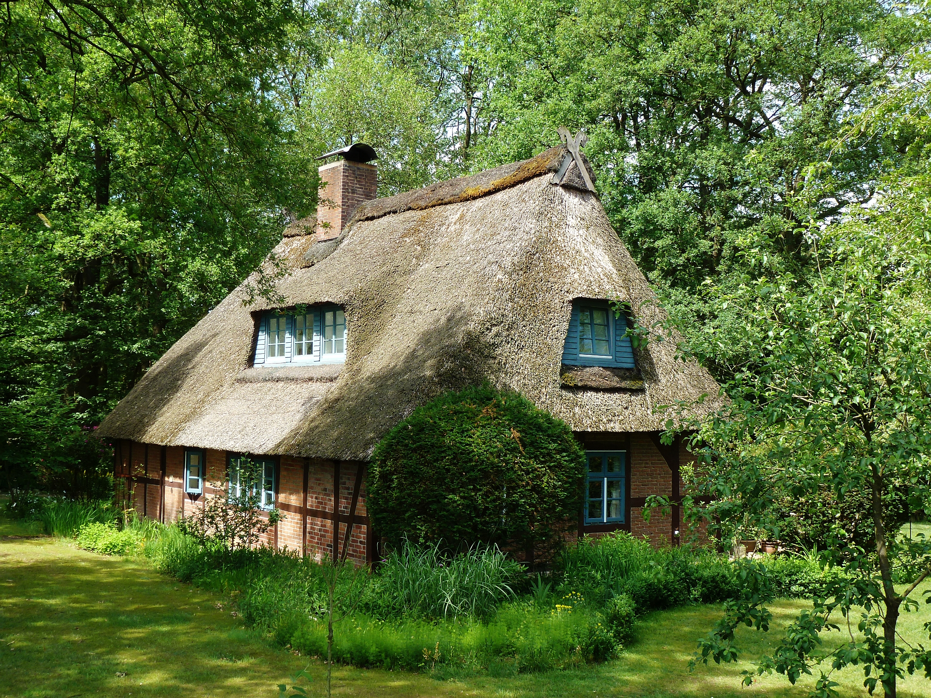 Fachwerkhaus mit Reetdach an der Sprengeler Dorfstraße in Neuenkirchen-Sprengel.